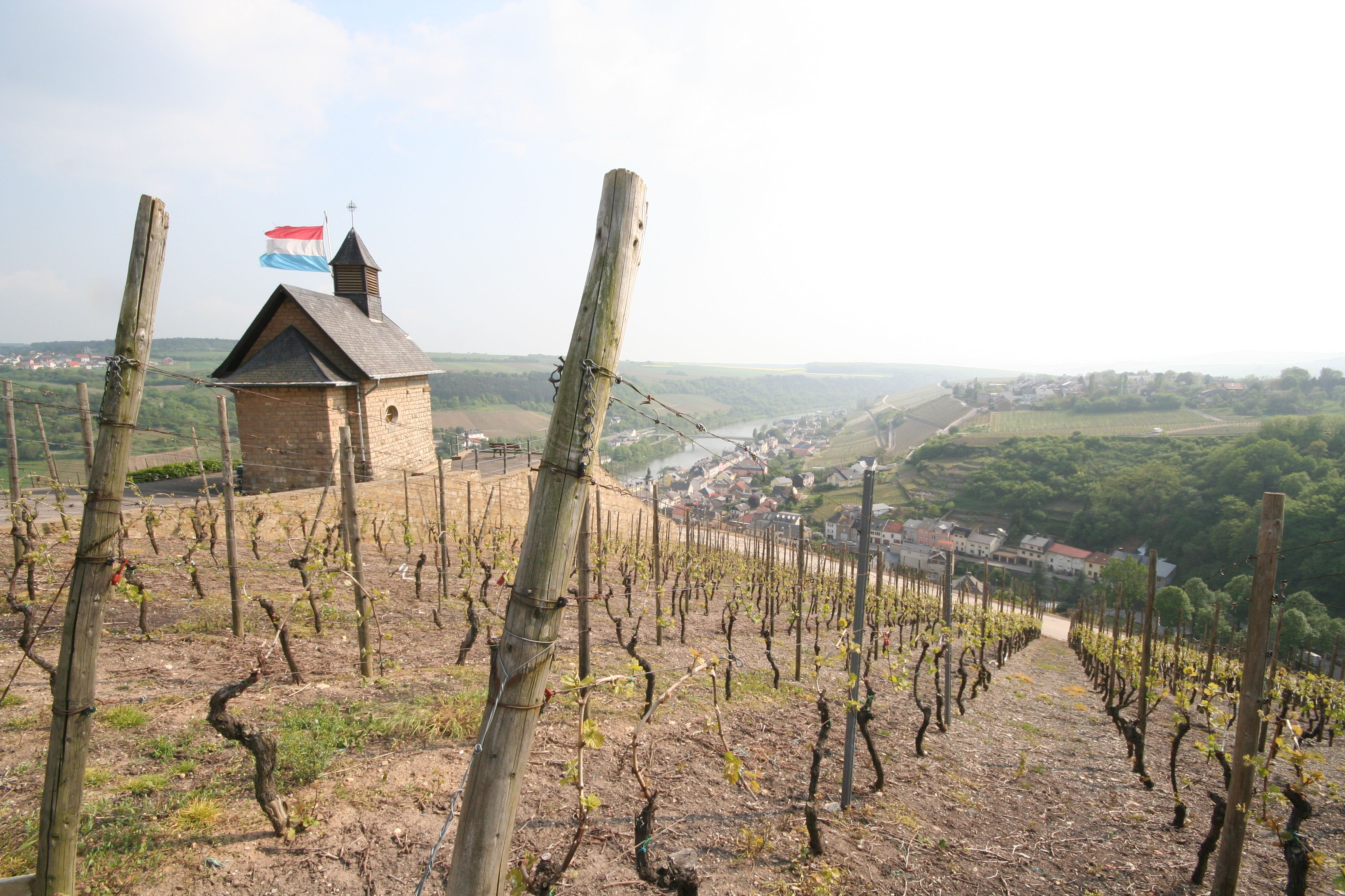 Koeppchen Kapell.